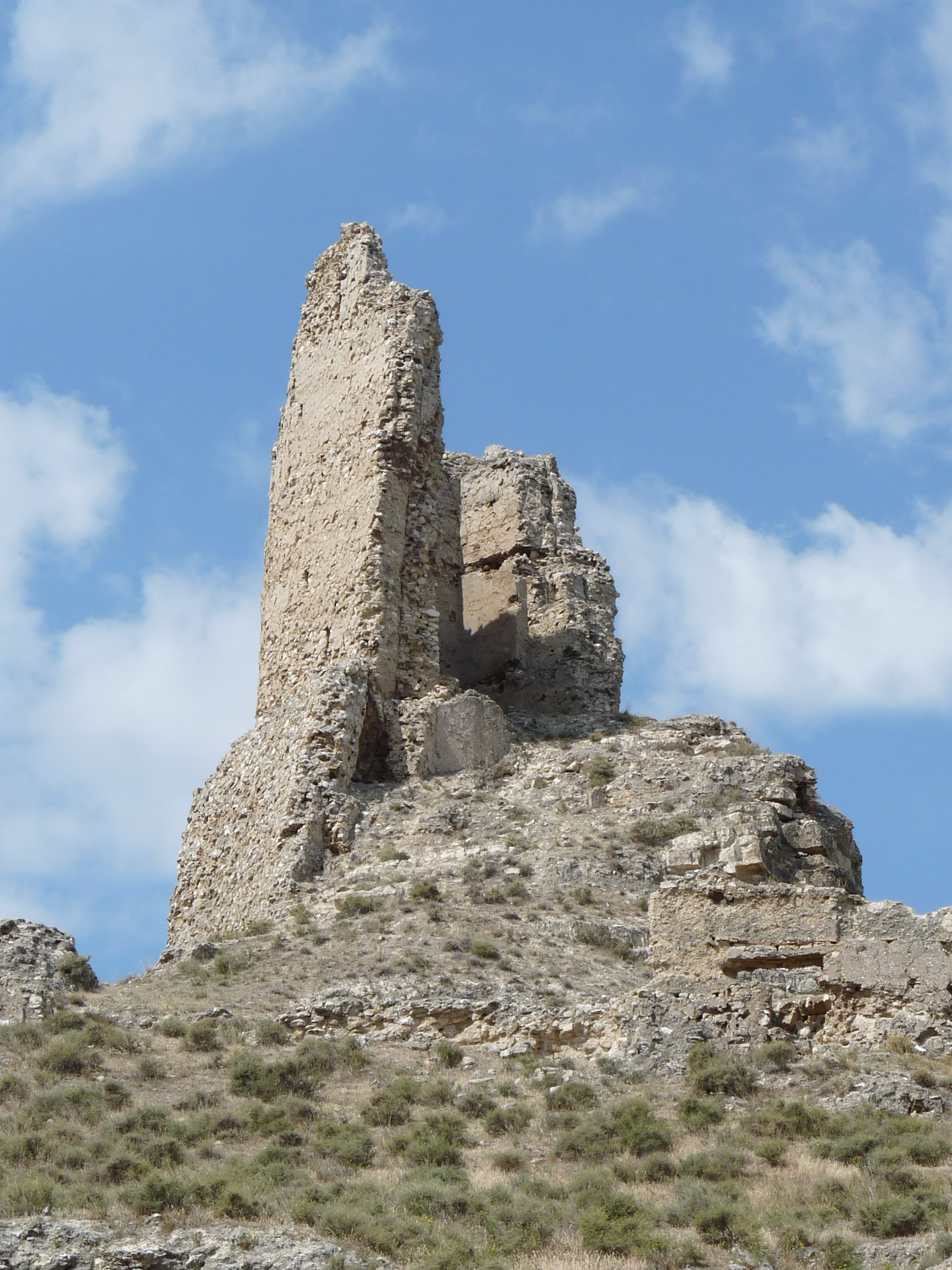 Rueda de Jalón - Castillo - Torre del homenaje